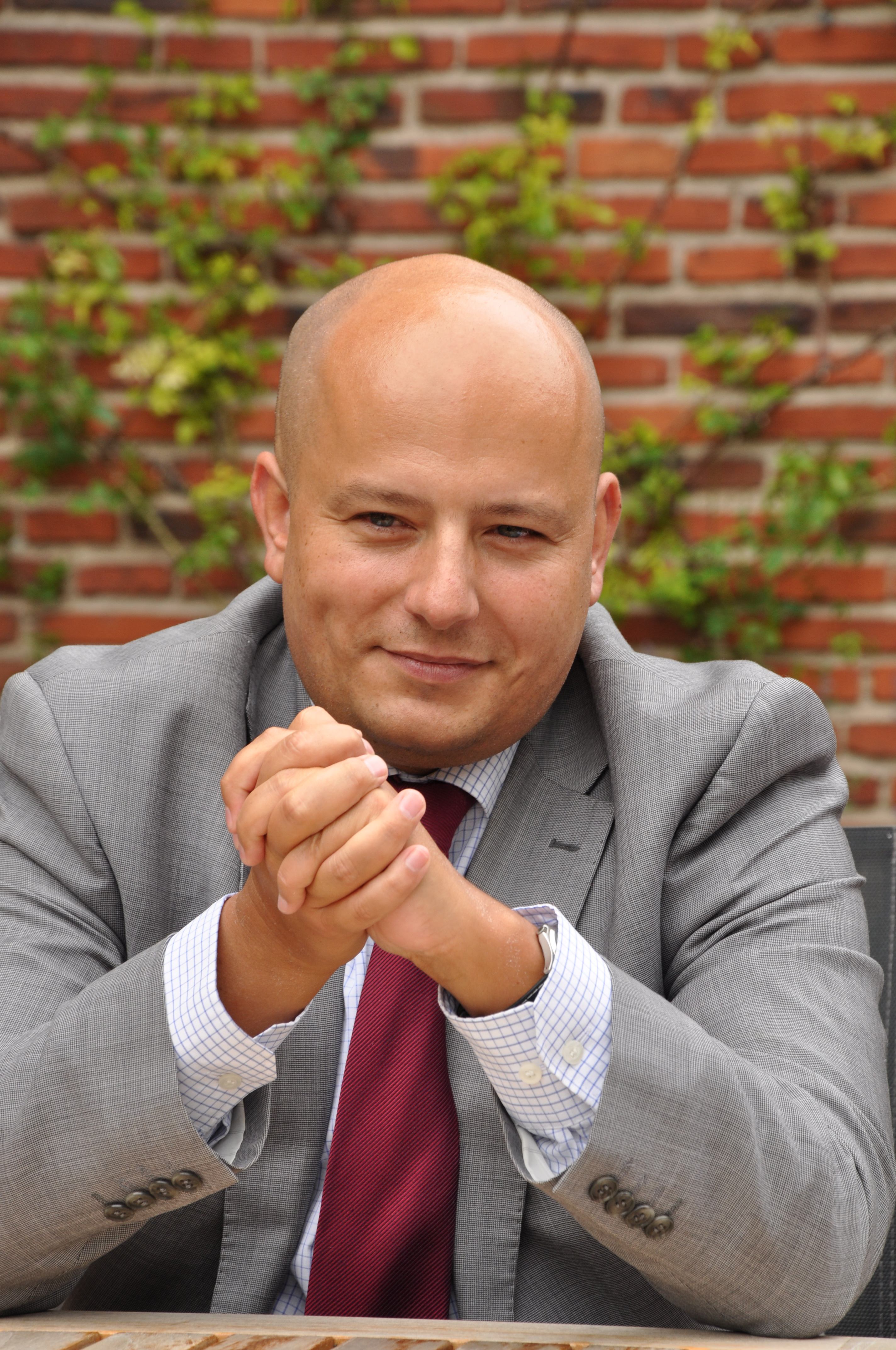 Mikolaj Dowgielewicz at a press briefing in Stockholm